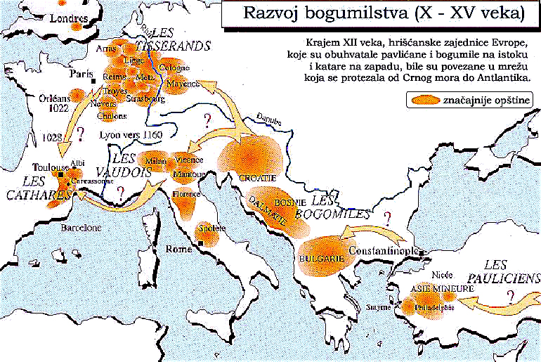 Razvoj bogumilstva (Development of Bogomillism)